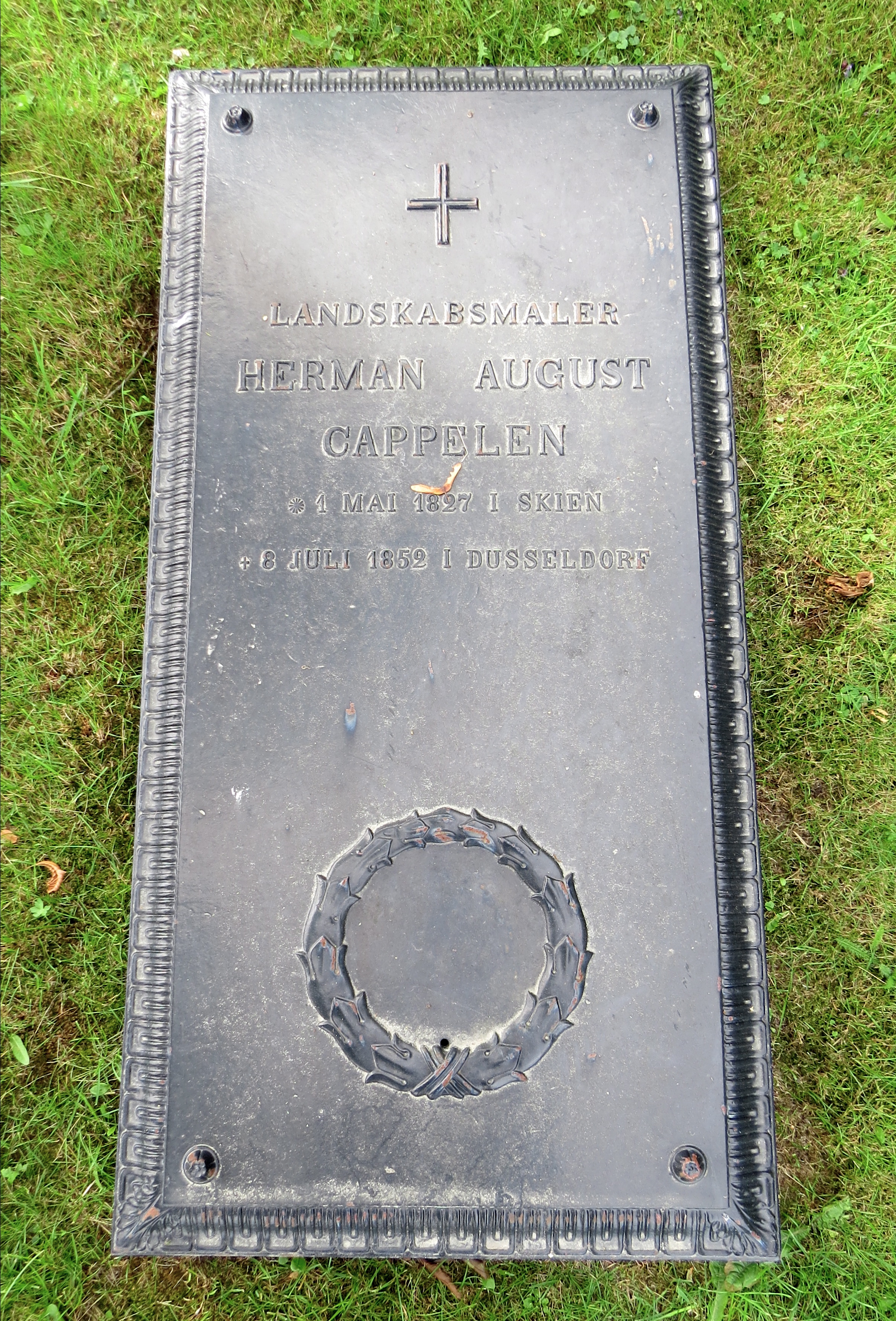 Landskabsmaler Herman August Cappelen * 1. Mai 1827 i Skien † 8 Juli 1852 i Düsseldorf Gravminde ved Hollen (Holla) Gamle Kirke, Ulefoss